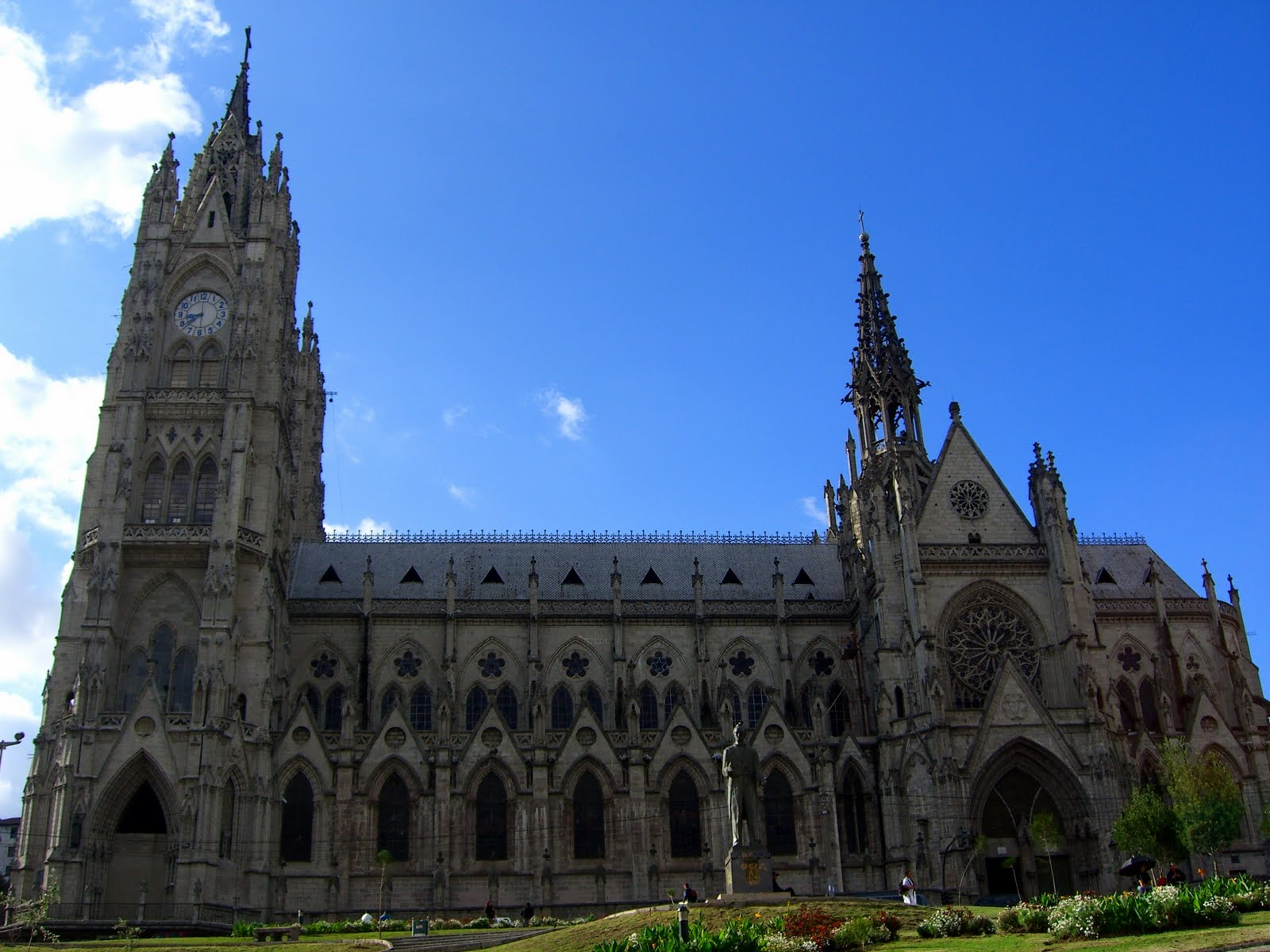 Vista de la fachada oriental de la Basílica del Voto Nacional, de la ciudad de Quito D.M.